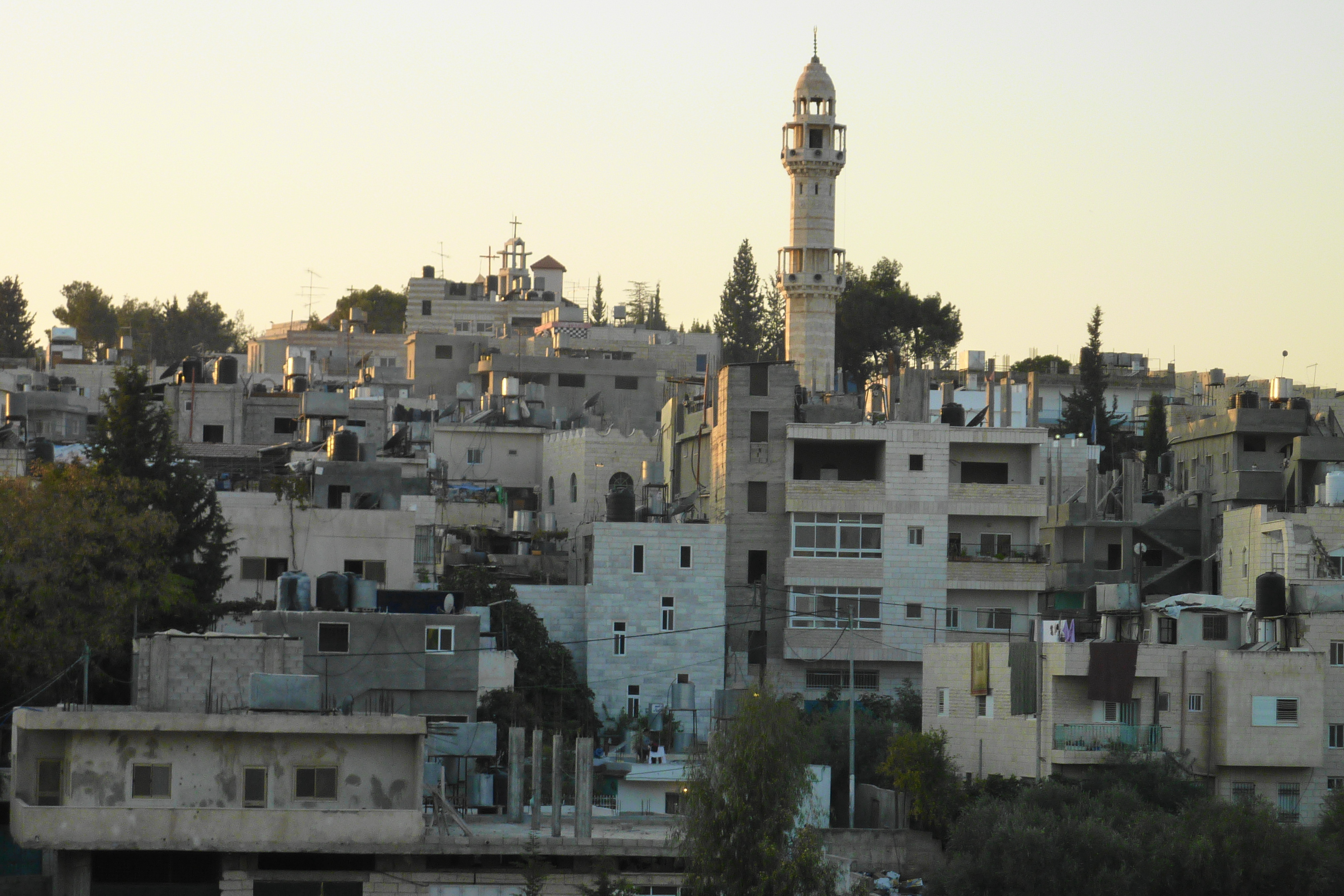 Aida refugee camp